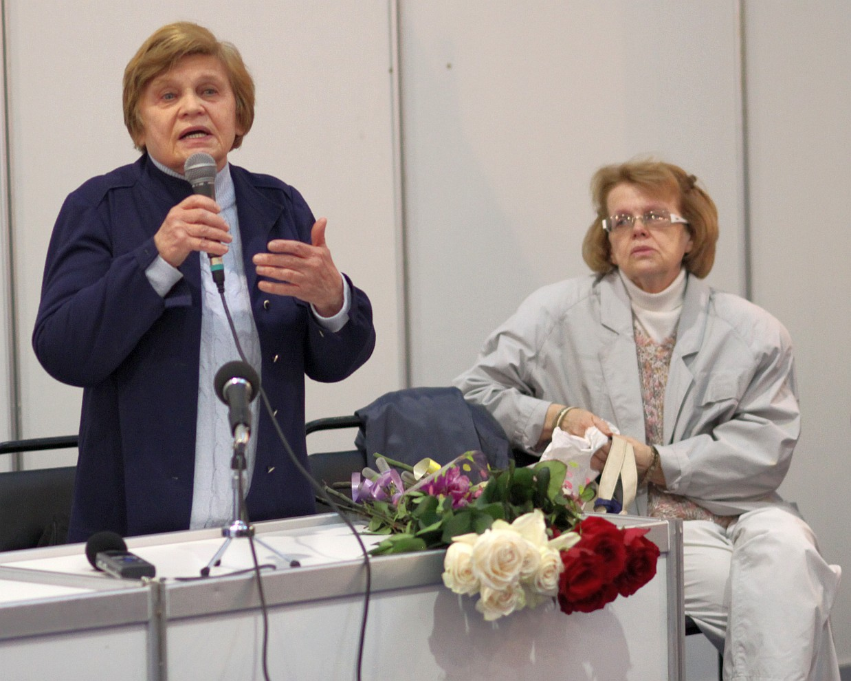 Valentina Tvardovskaya (b. 1931, standing) and Olga Tvardovskaya - daughters of Aleksandr Tvardovsky